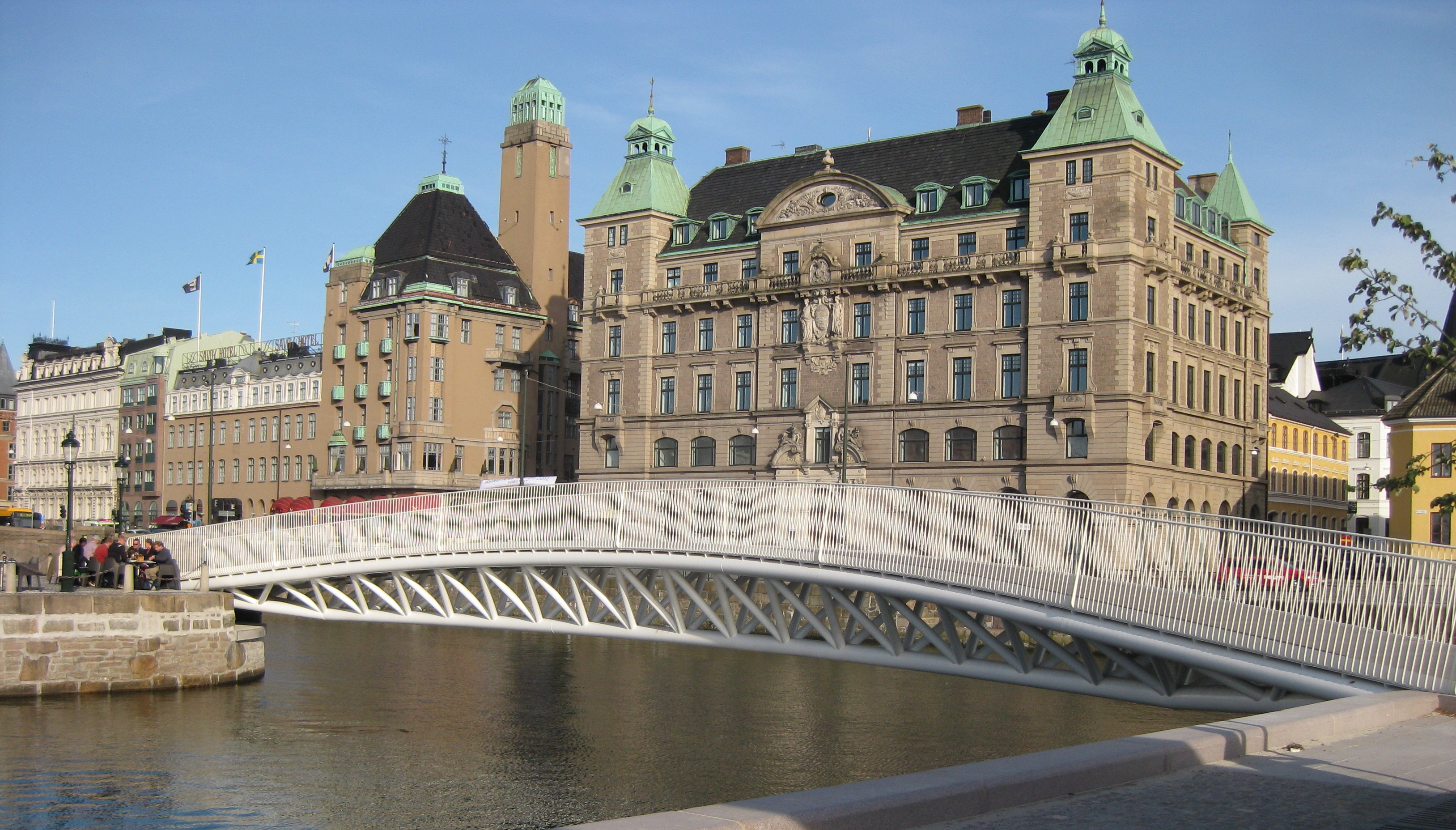 Bagers bro, gångbro i Malmö